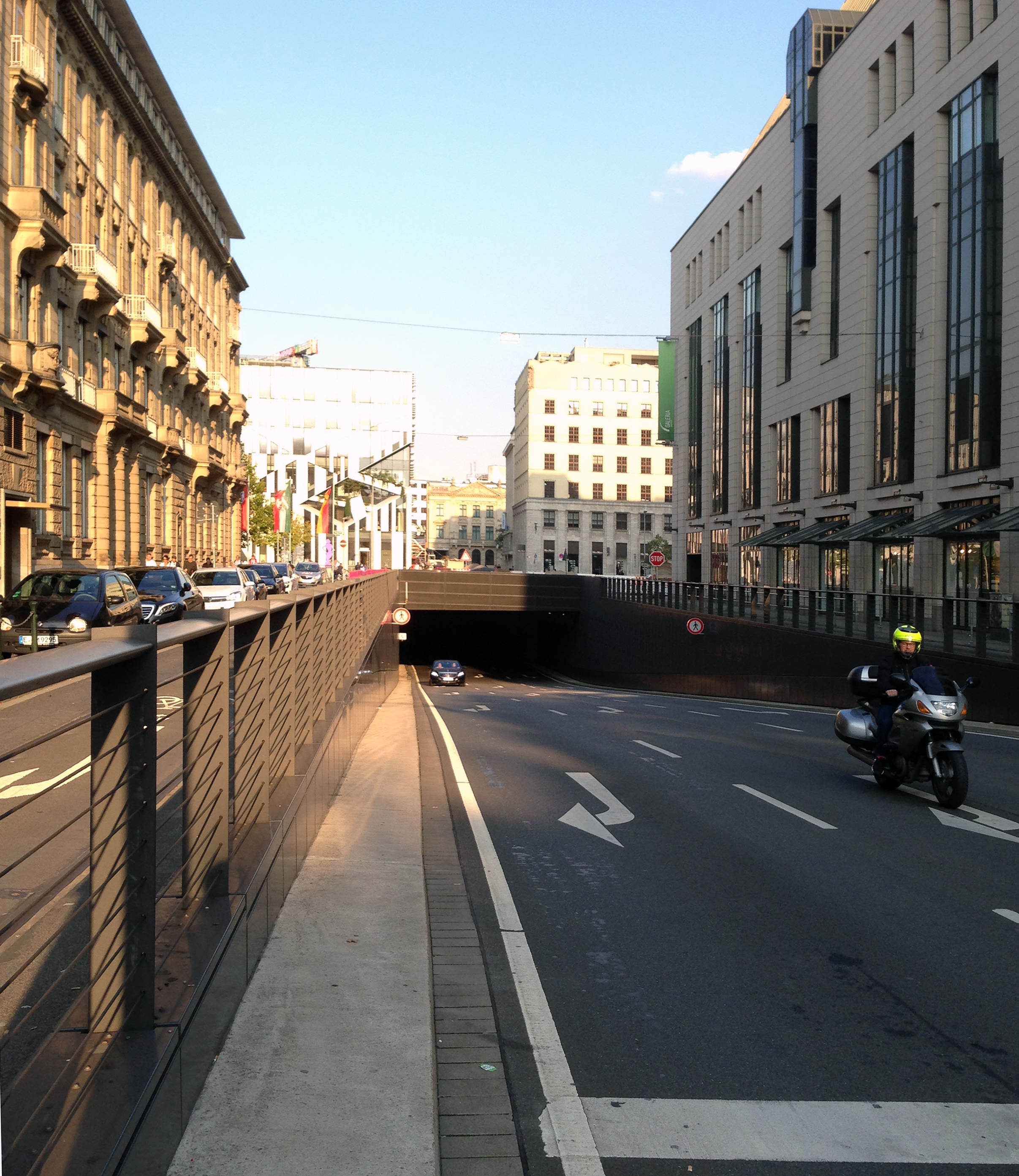 Tunnelausfahrt Elberfelder Straße